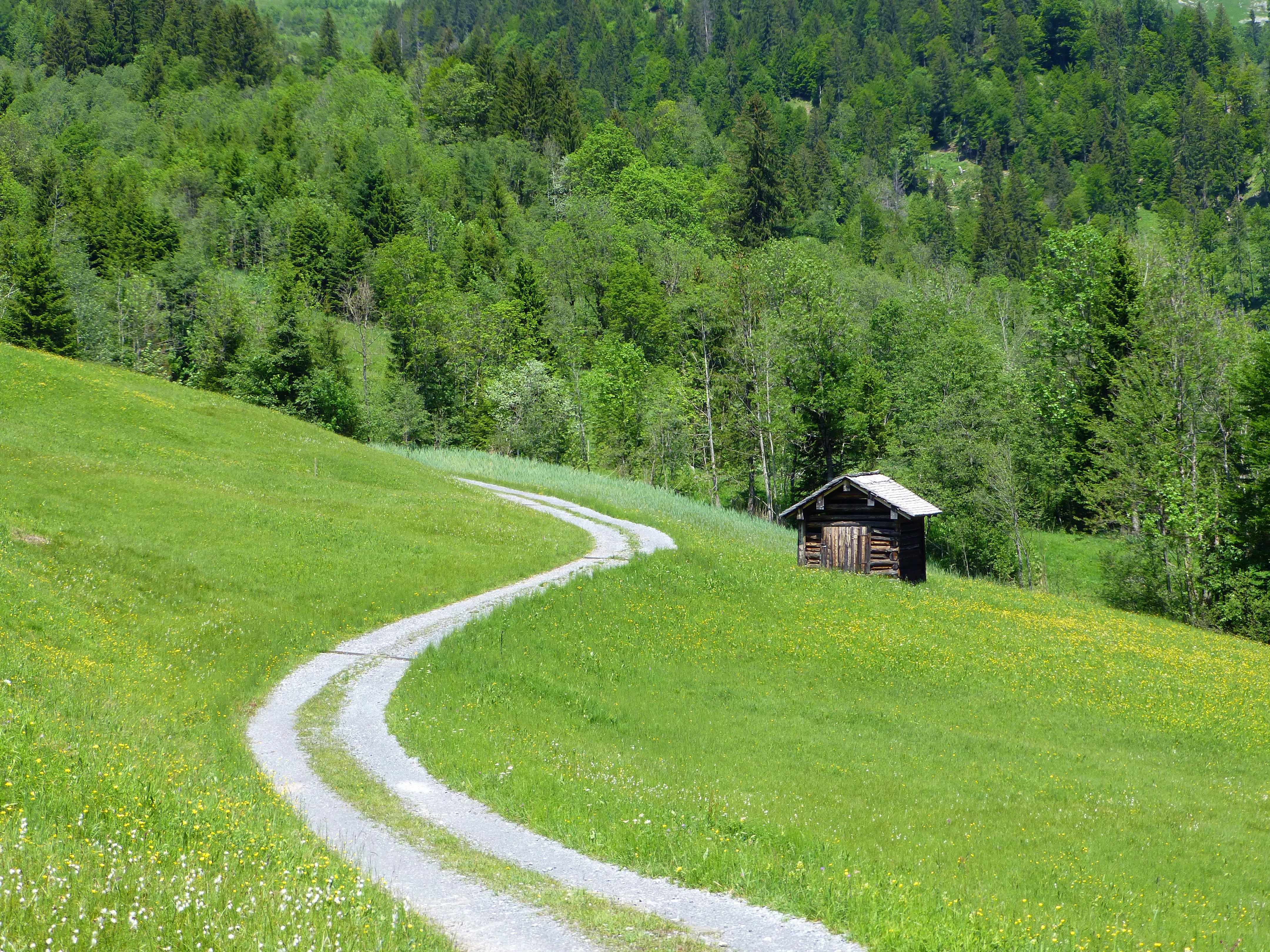 das Naturschutzgebiet Auer Ried in der österreichischen Gemeinde Au This media shows the nature reserve in Vorarlberg with the ID 8002.